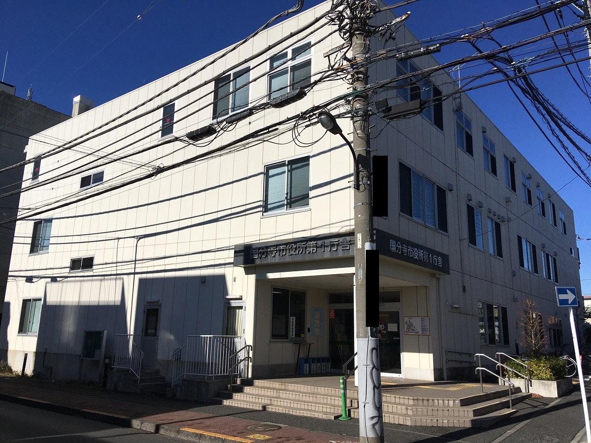 国分寺市役所第一庁舎